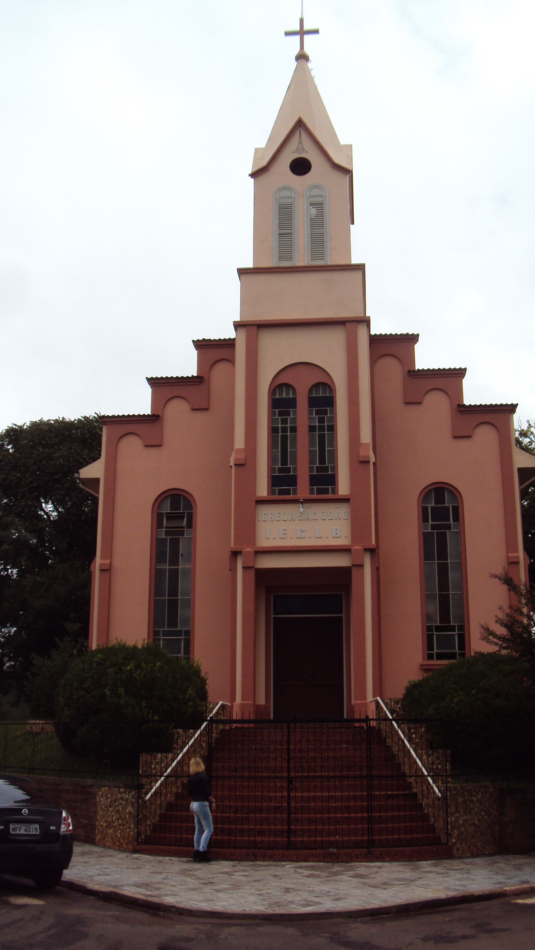 IECLB de Getúlio Vargas